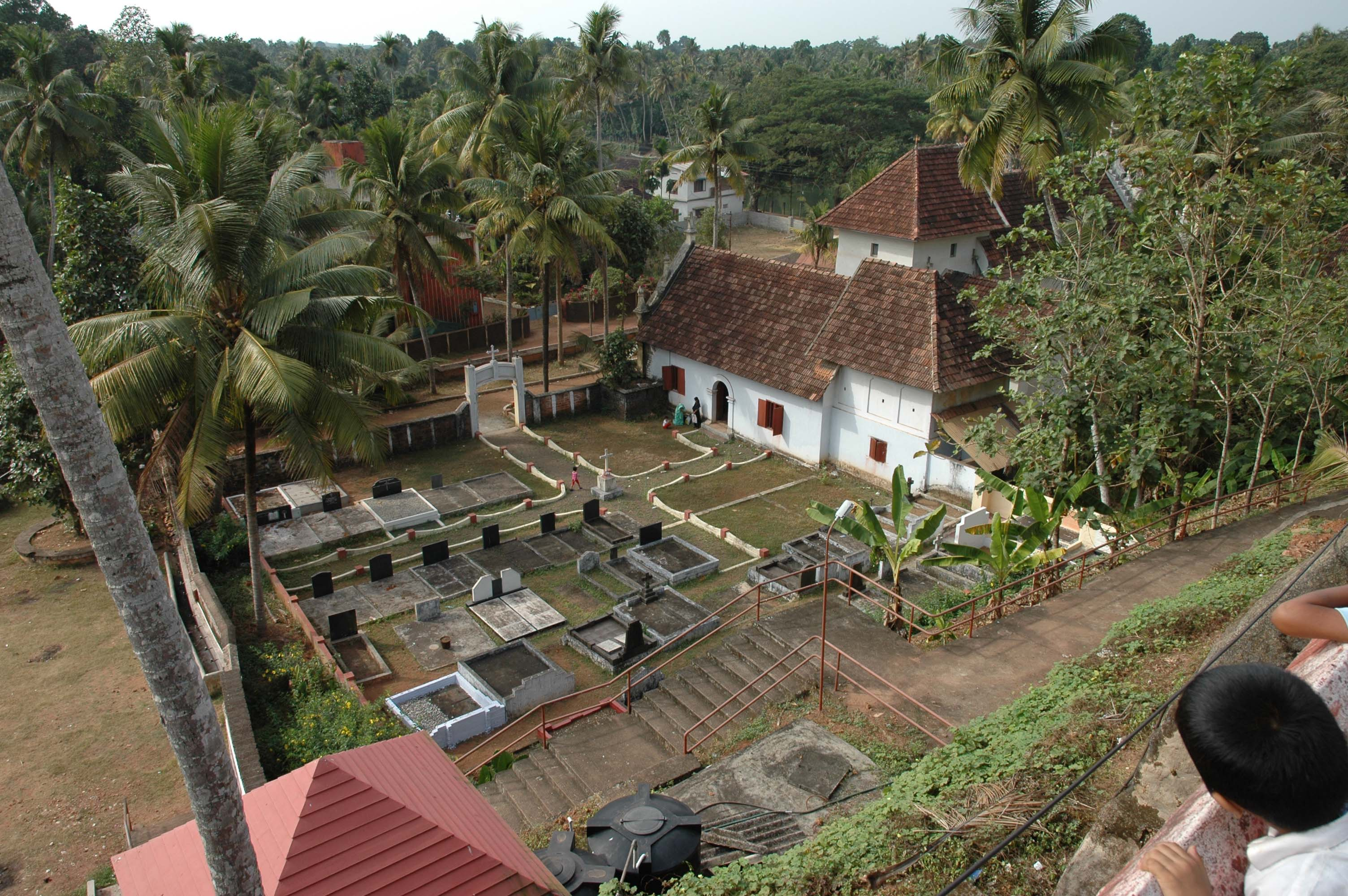 Kottayam Valiyapally (St. Mary's Knanaya Church) cemetery (Kerala, India)